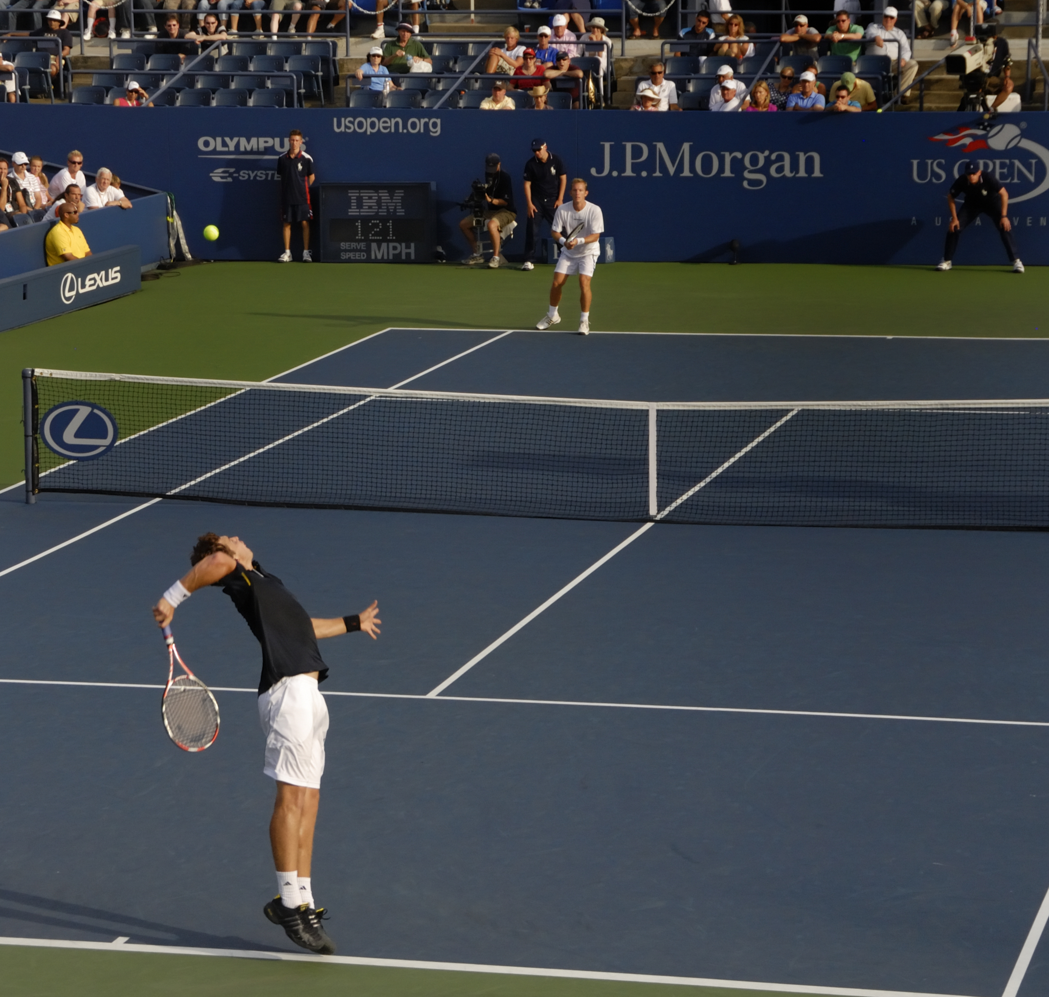 US Open